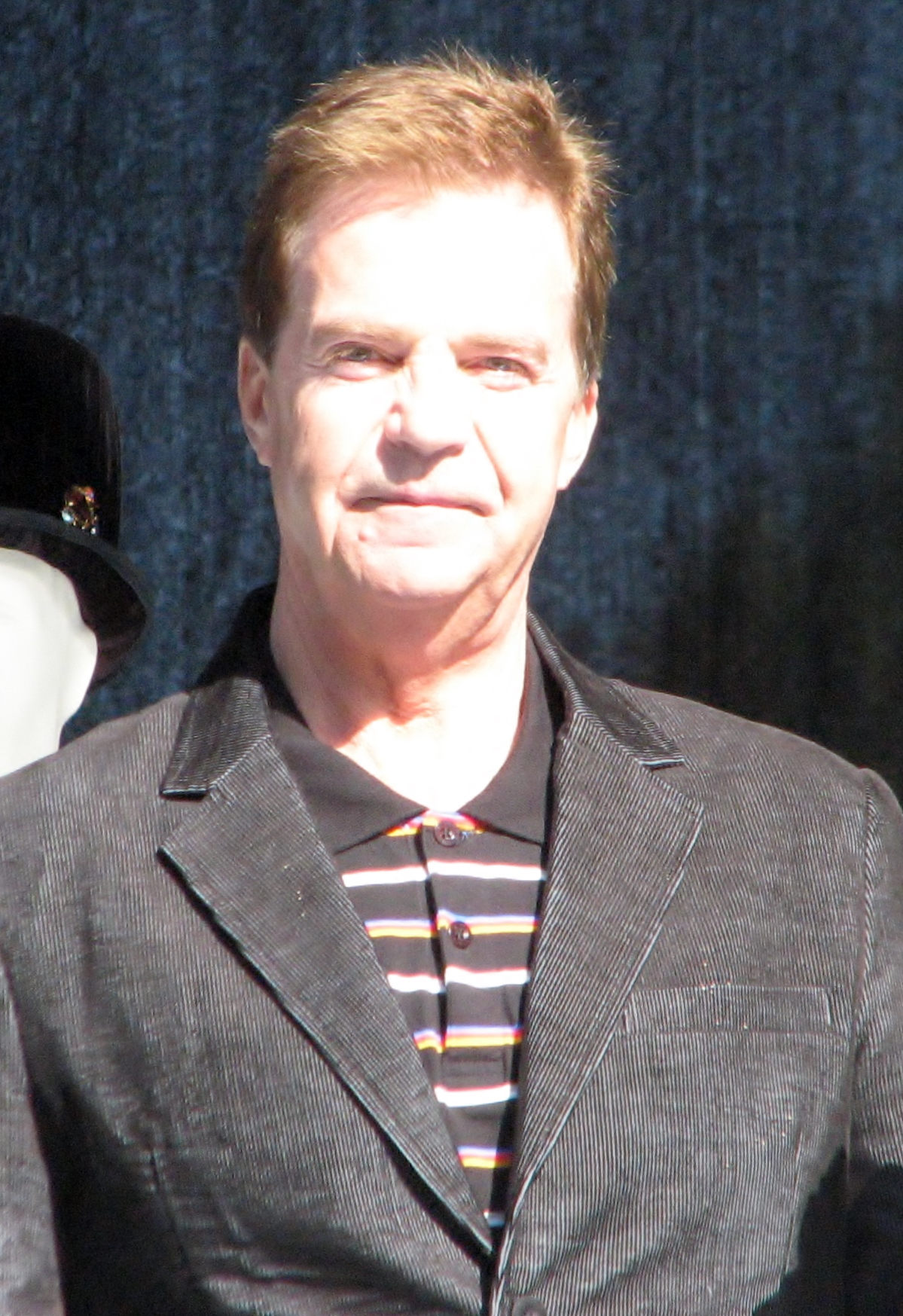 Tõnu Kilgas Estonia 109. hooaja avamisel